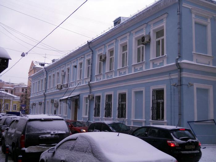 Дом братьев Фонвизиных, фасад по переулку